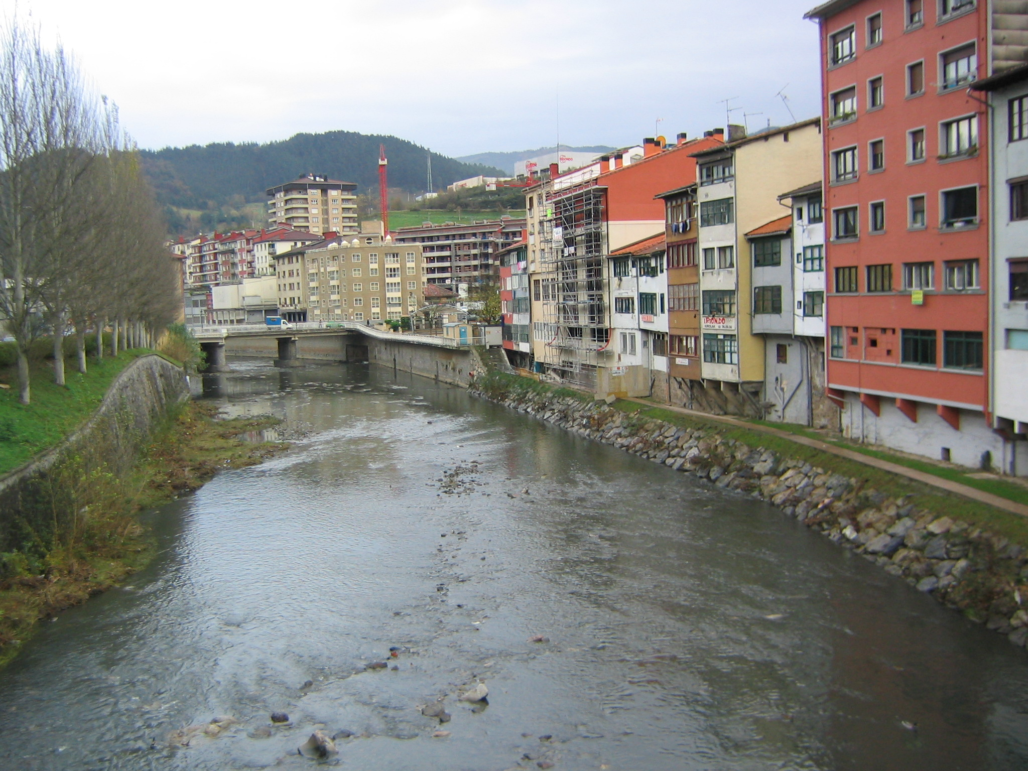 Río Deba a su paso por Elgoibar, Guipúzcoa, País Vaco, España.